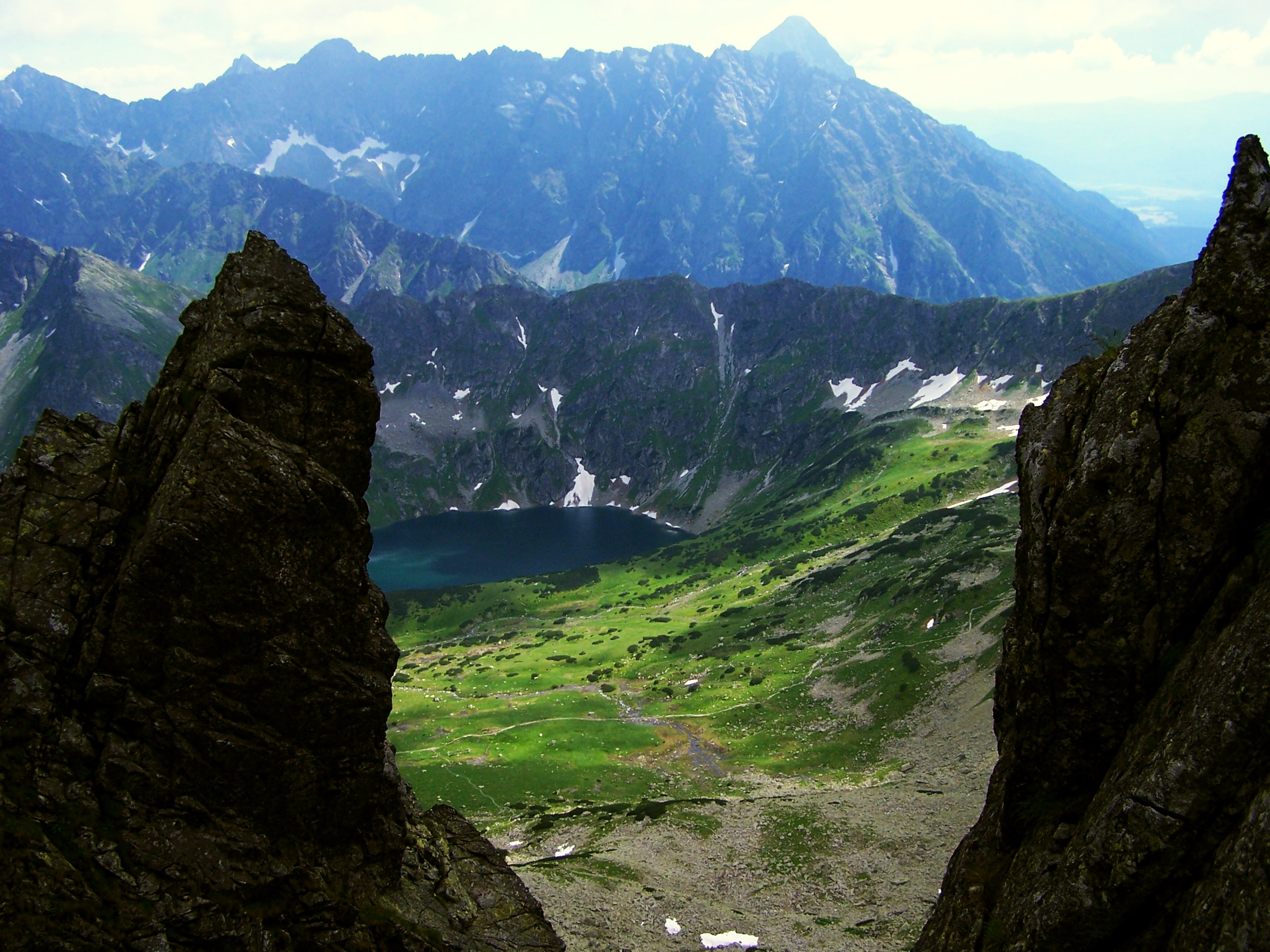 Orla Perć. Dolina 5 Stawów Polskich